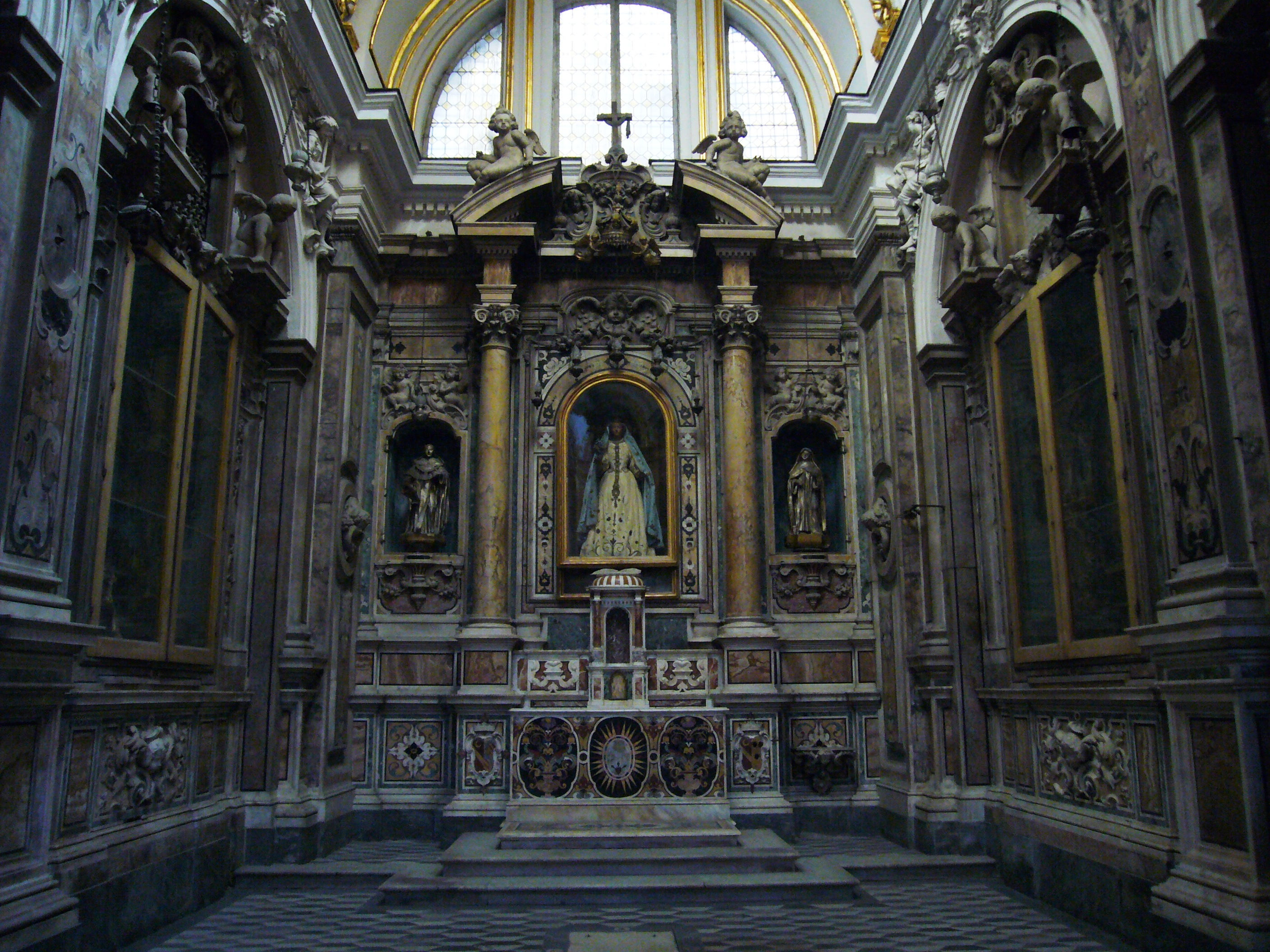 Napoli, san Domenico Maggiore: Cappella della Madonna di zi' Andrea